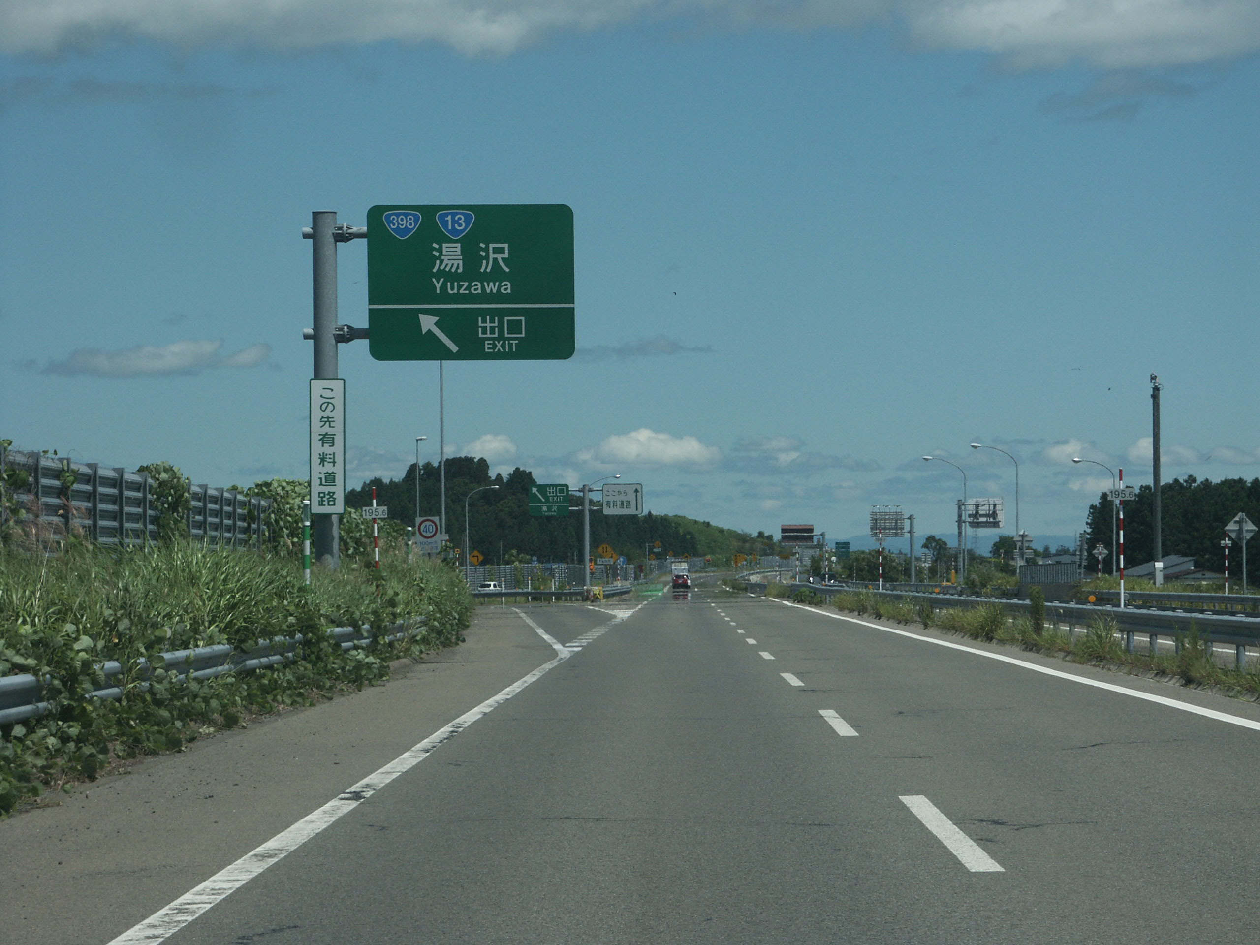 東北中央自動車道（湯沢横手道路）湯沢IC出口（雄勝こまちIC方面側）